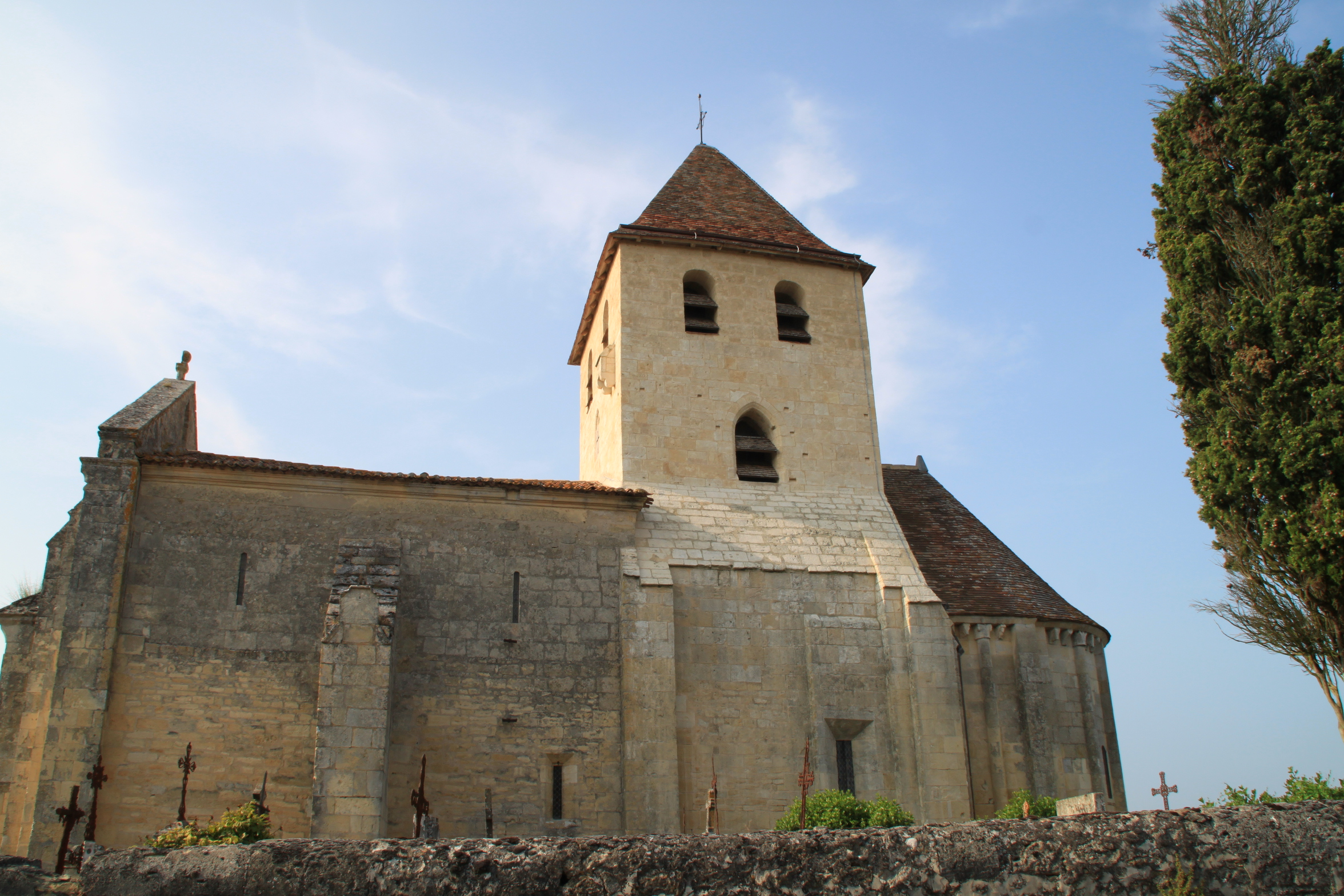 façade sud de l'église de Saint-Vincent-de-Pertignas. (Gironde)